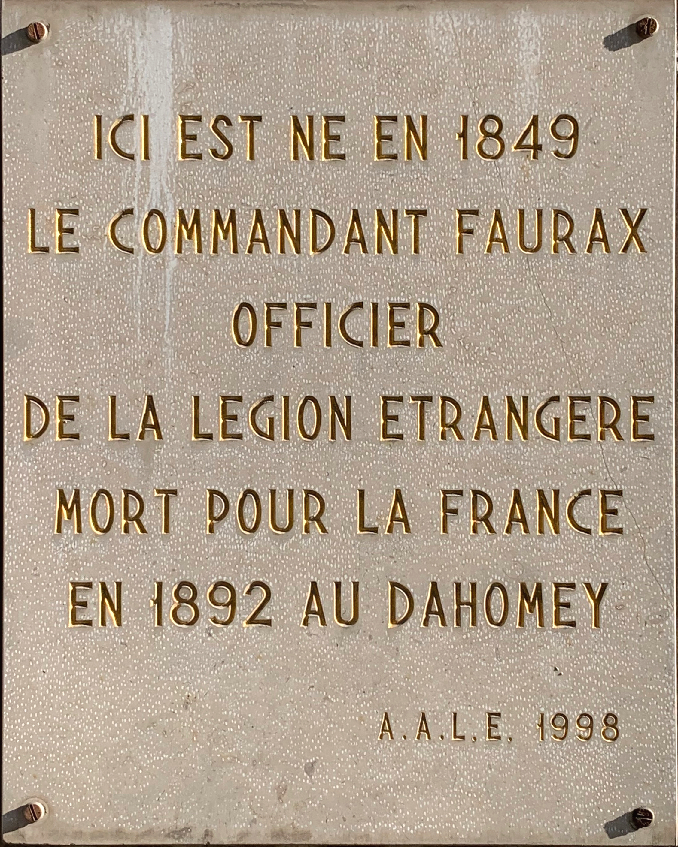 Plaque maison natale du Commandant Faurax, Cours Franklin Roosevelt (Lyon). recto in engraving: ICI EST NE EN 1849 LE COMMANDANT FAURAX OFFICIER DE LA LEGION ETRANGERE MORT POUR LA FRANCE EN 1892 AU DAHOMEY A.A.L.E. 1998